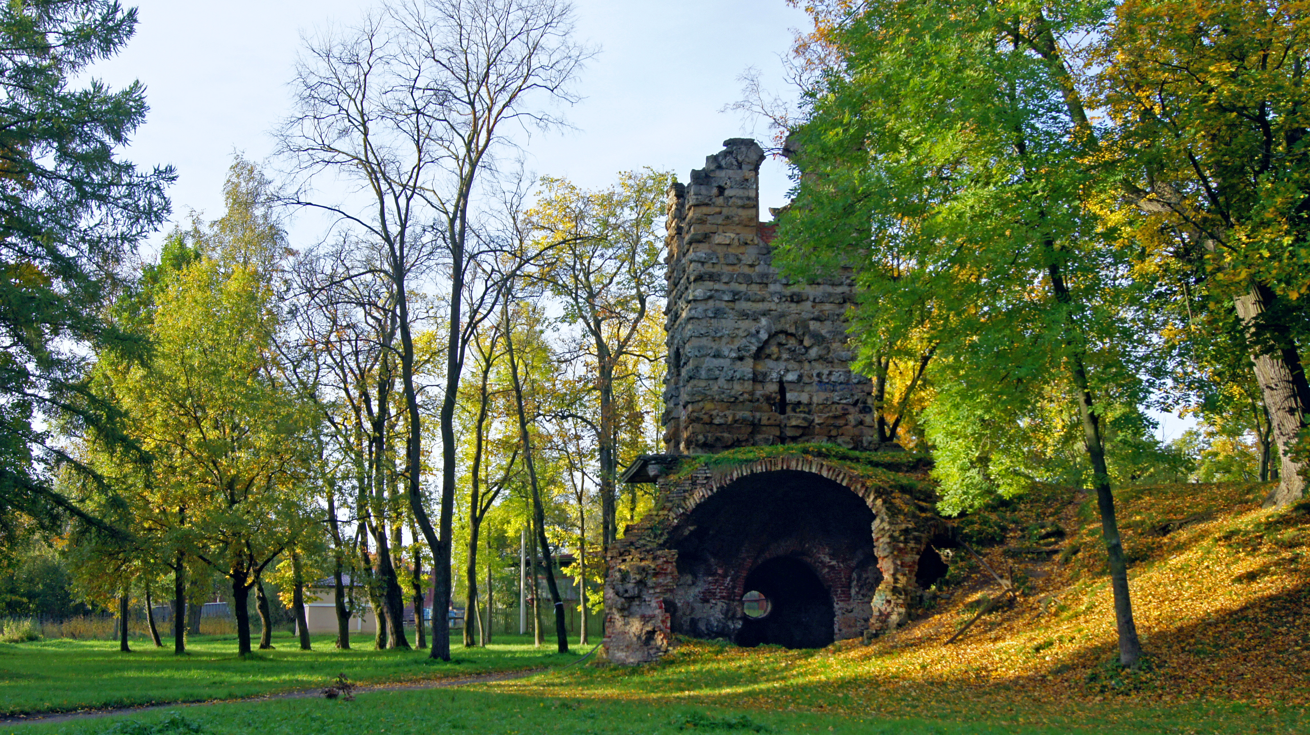 Башня-развалина в Орловском парке пос. Стрельна, Ленинградской области.